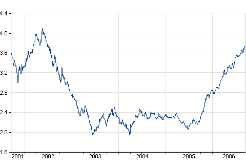 Evolución del Euribor a 1 meses durante 5 años